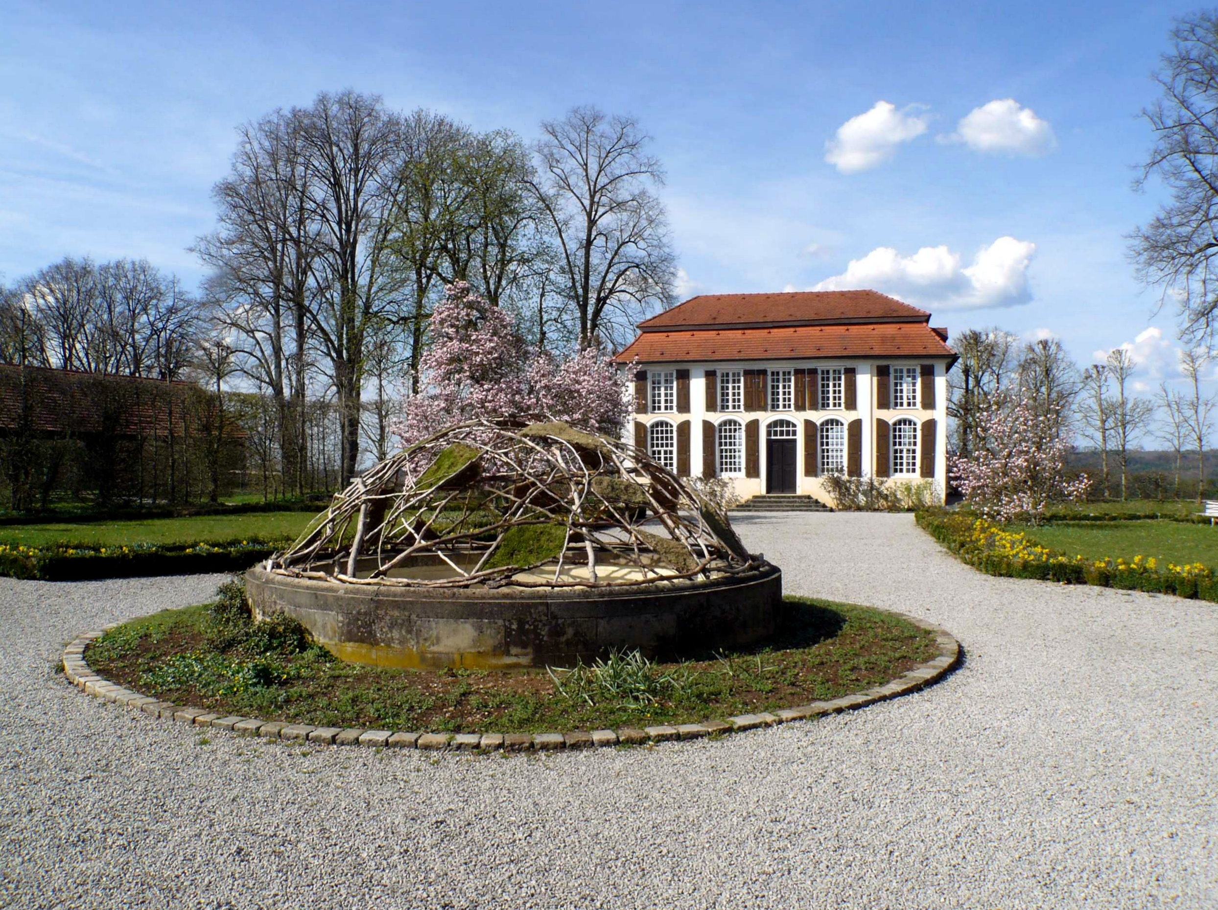 Lusthaus im Heckengarten in Hohenstadt, Gemeinde Abtsgmünd, mit dekoriertem Brunnen im Vordergrund